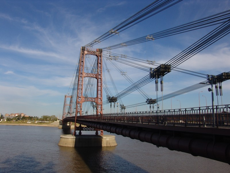 Puente Colgante, Santa Fe (Argentina)